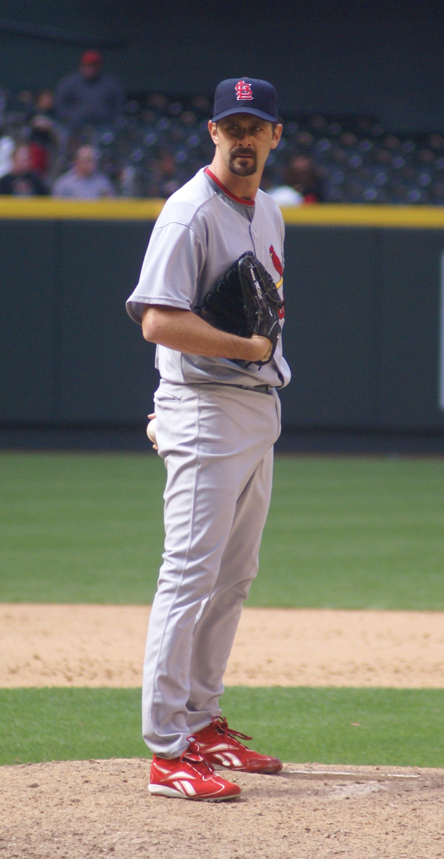 Trever Miller